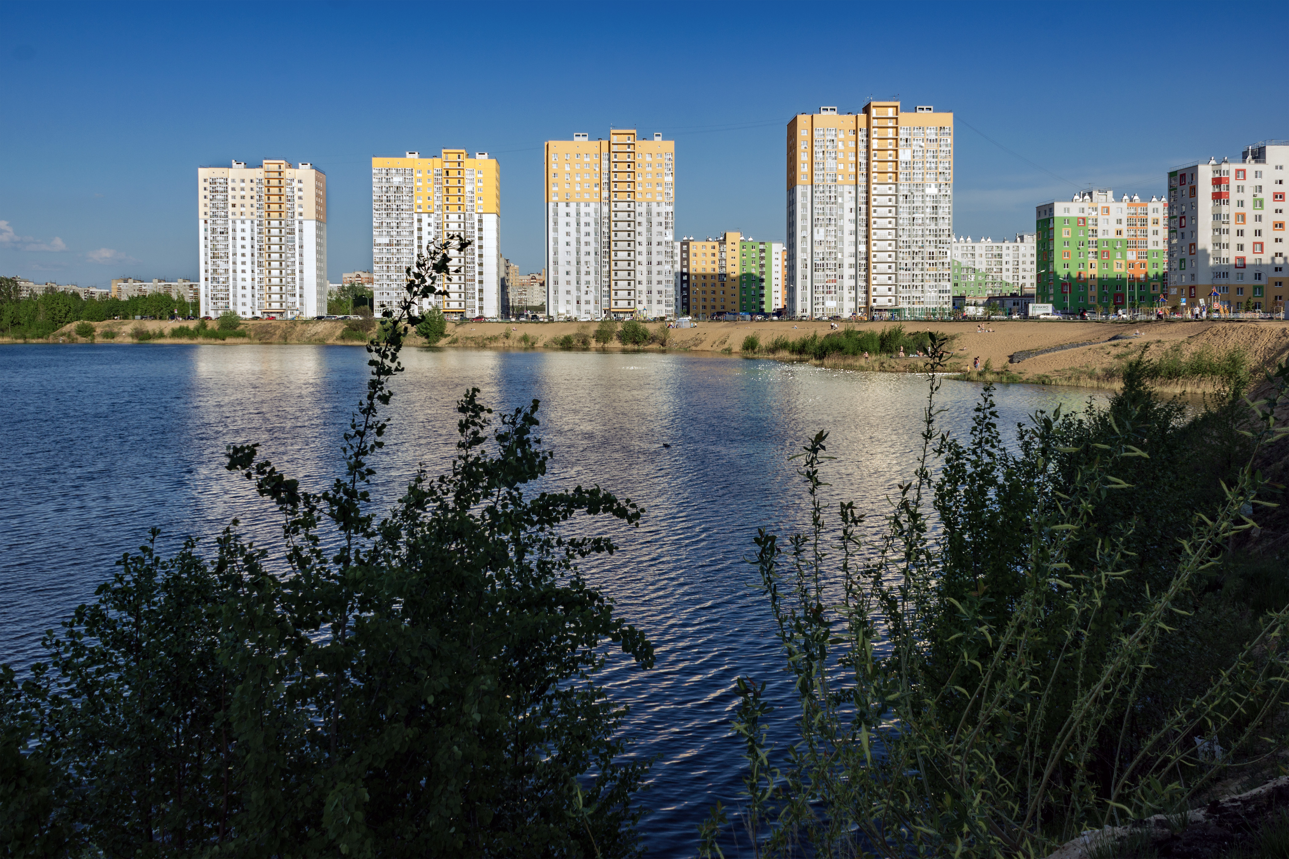 Нижний Новгород. Микрорайон по улице Бурнаковской